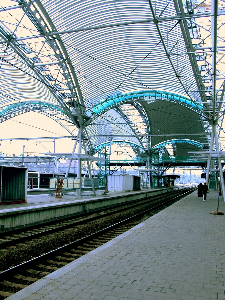 Overdekking Station NMBS Leuven